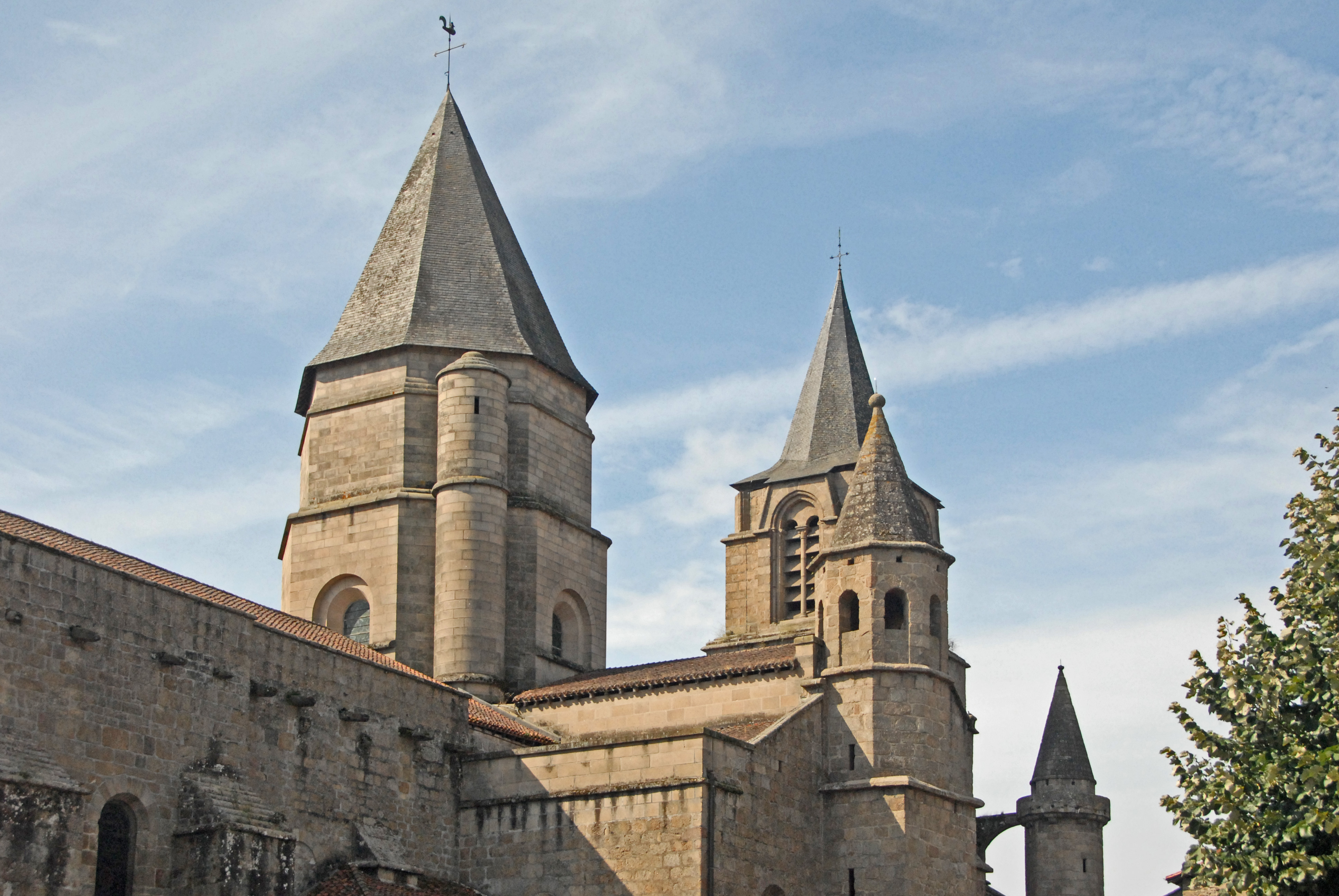 nördl. Querhausarm u. Vierungsturm von N